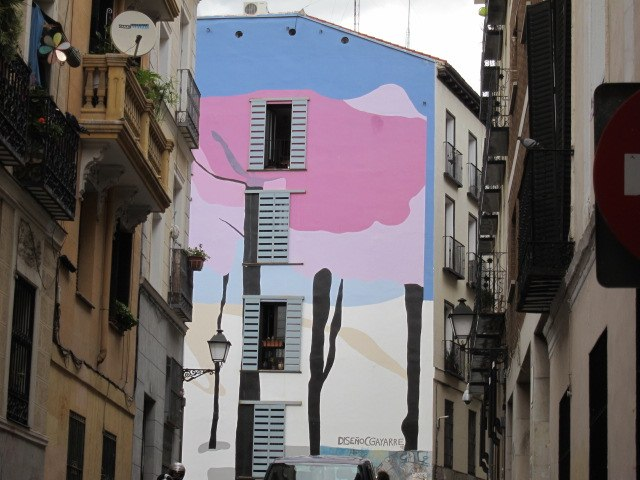 Lavapies. Calle de los Ministriles Chica